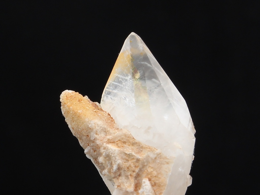 Calcita provinent de la pedrera Cal Ros (Ballús), Cercs, Berguedà, Barcelona, Catalunya.Mides: 2.8 x 1.7 x 1.7 cm.